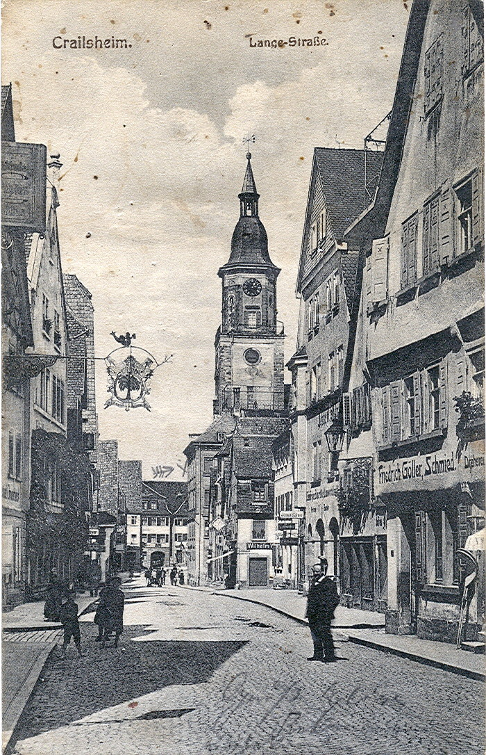 Postkarte, undatiert ( ca.1914). Beschriftung: "Crailsheim - Lange Straße".